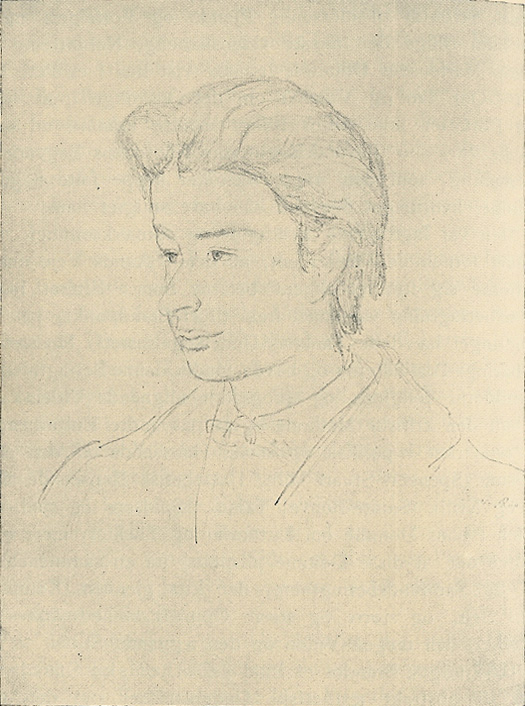 Georg Brandes som ung. Tegning fra 1868 af Gotfred Rump.